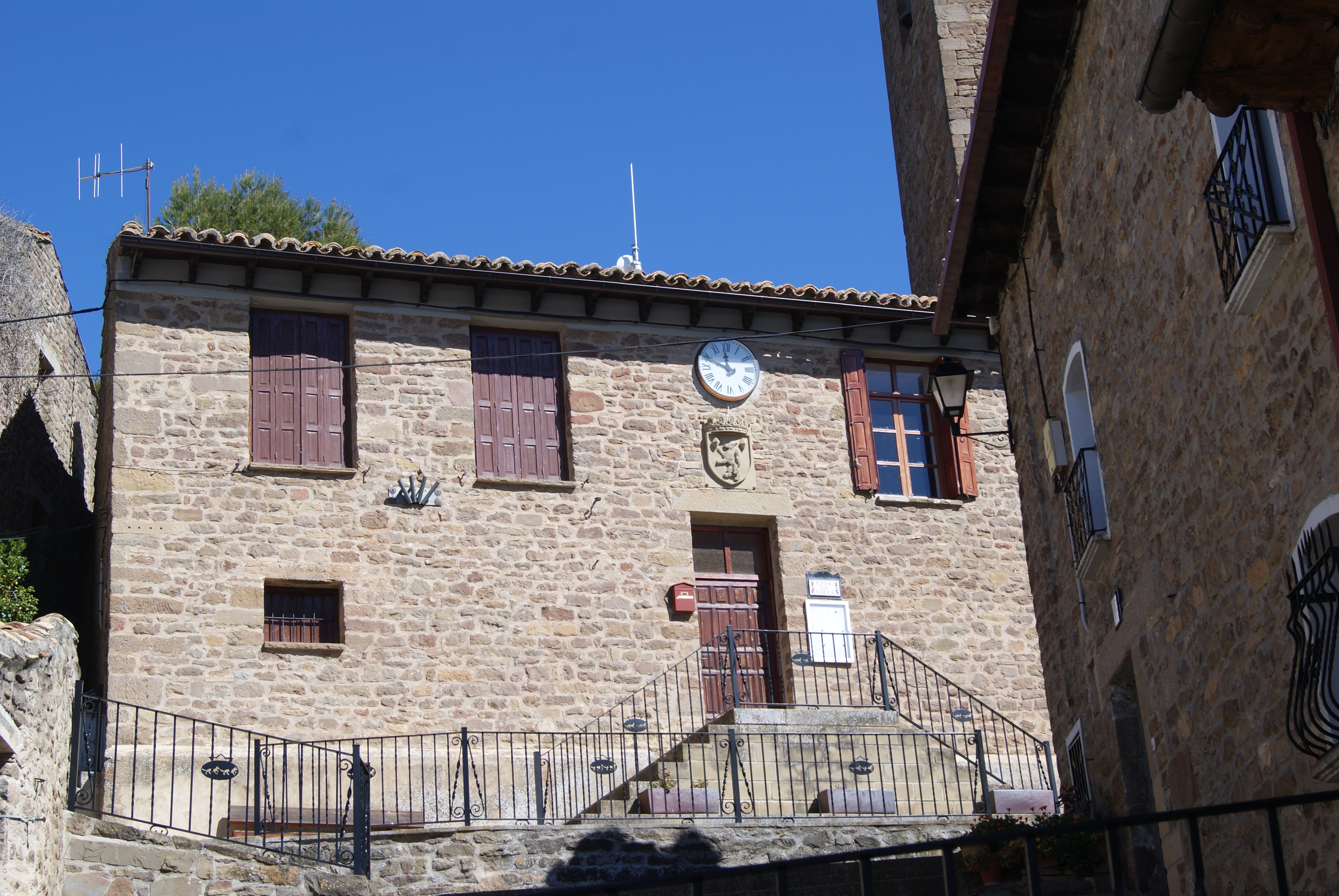 Lobera de Onsella (Zaragoza)